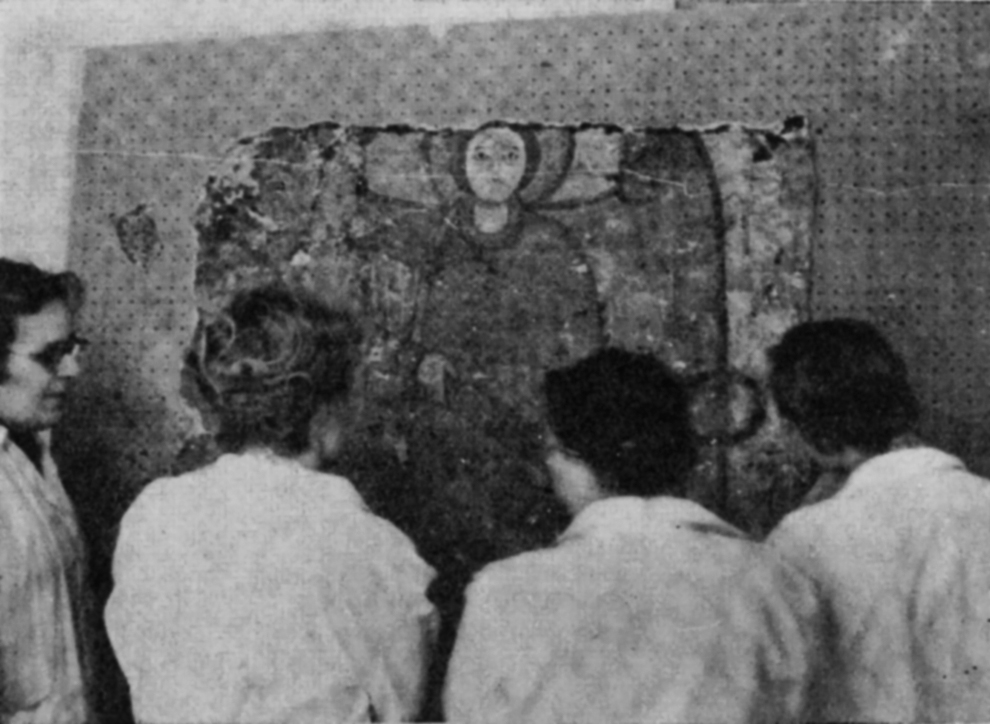 Prace konserwatorskie przy malowidłach z Faras w Muzeum Narodowym w Warszawie. Lico malowidła anioła po przyśrubowaniu do przygotowanego tła